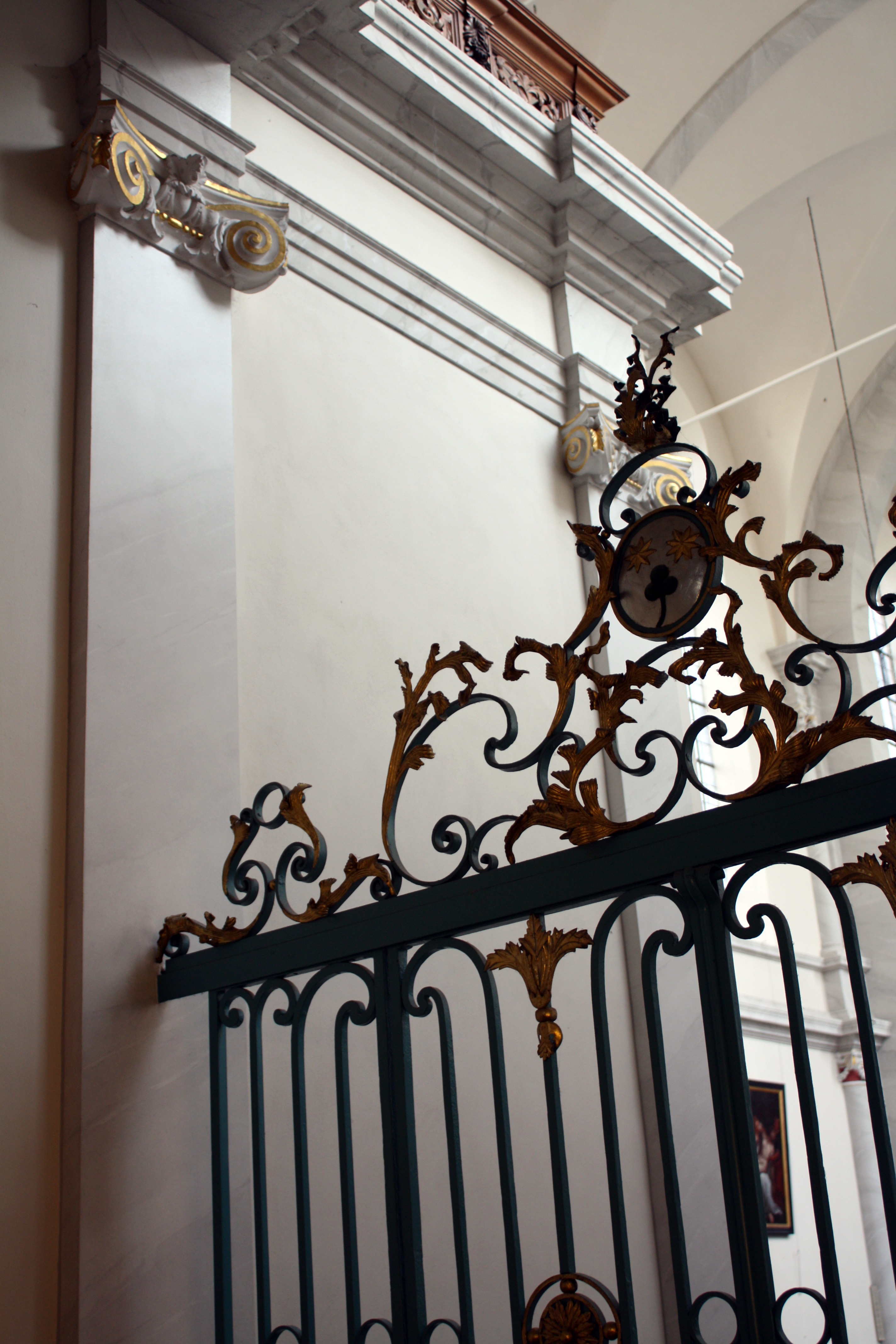 Köln, St. Maria in der Kupfergasse, Wappen der von Groote im Gitterwerk